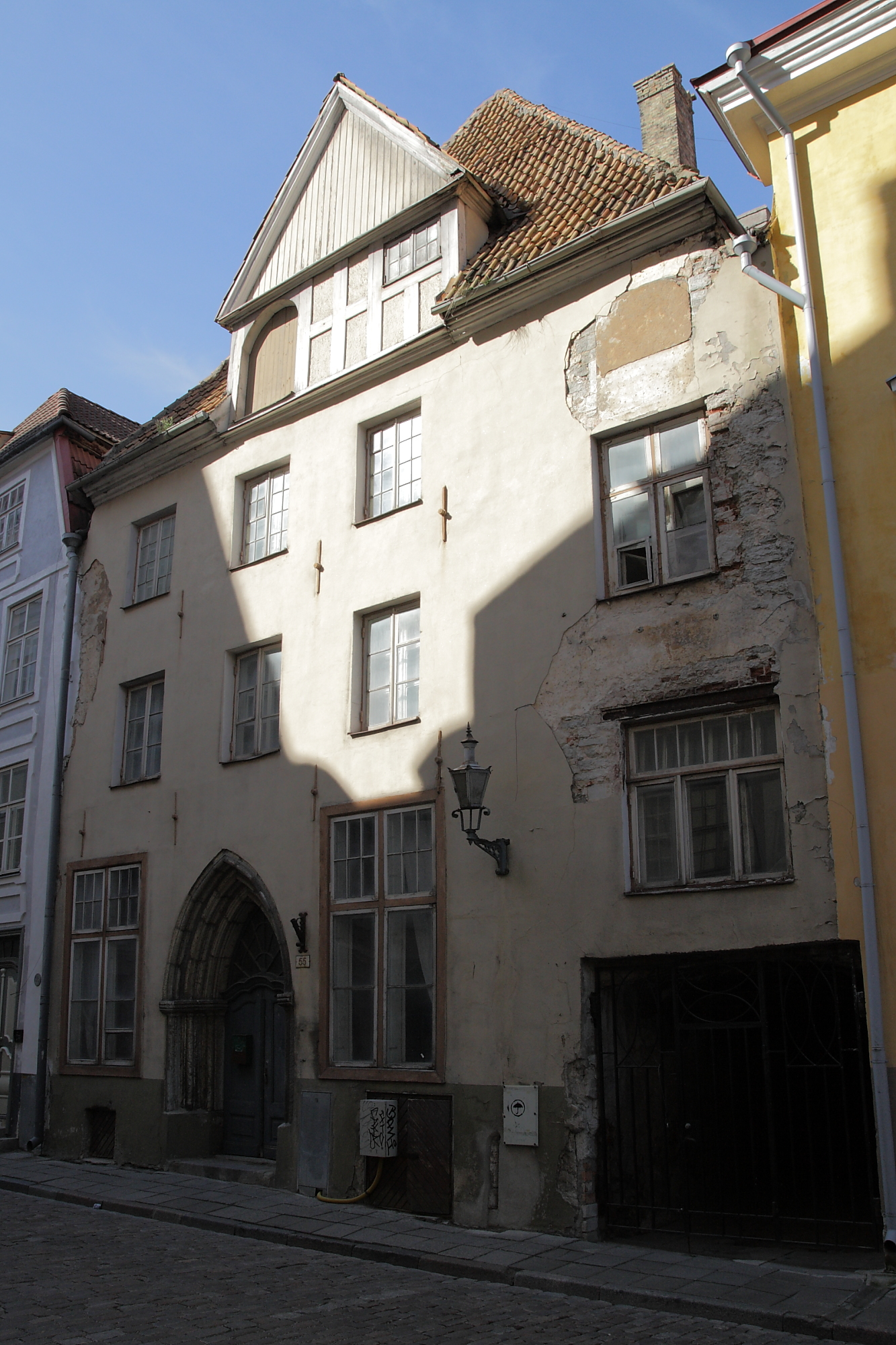 Tallinn, elamu Pikk 55, 15.-20.saj